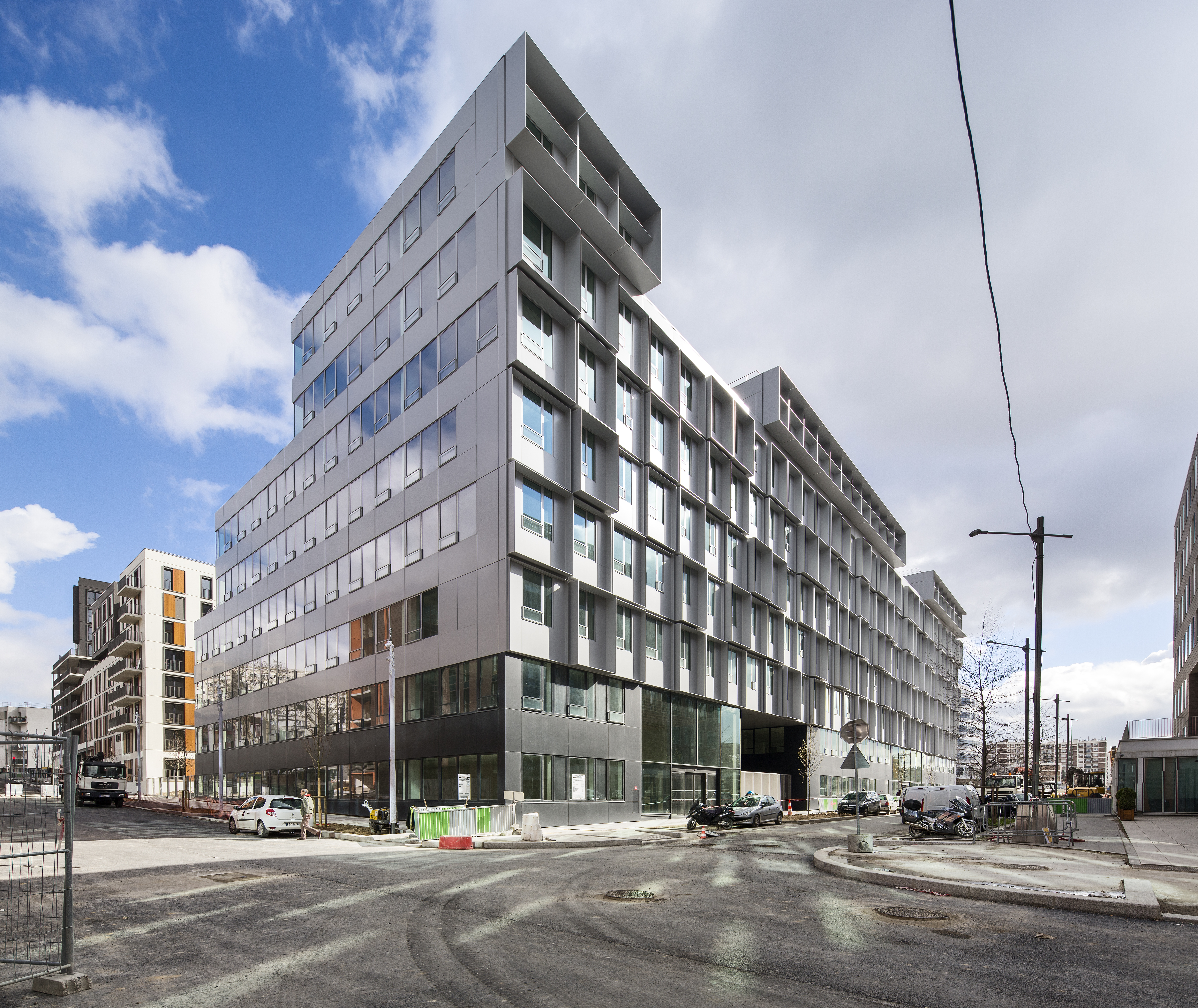 Photo de l'éco-quartier Docs en Seine, à Saint Ouen